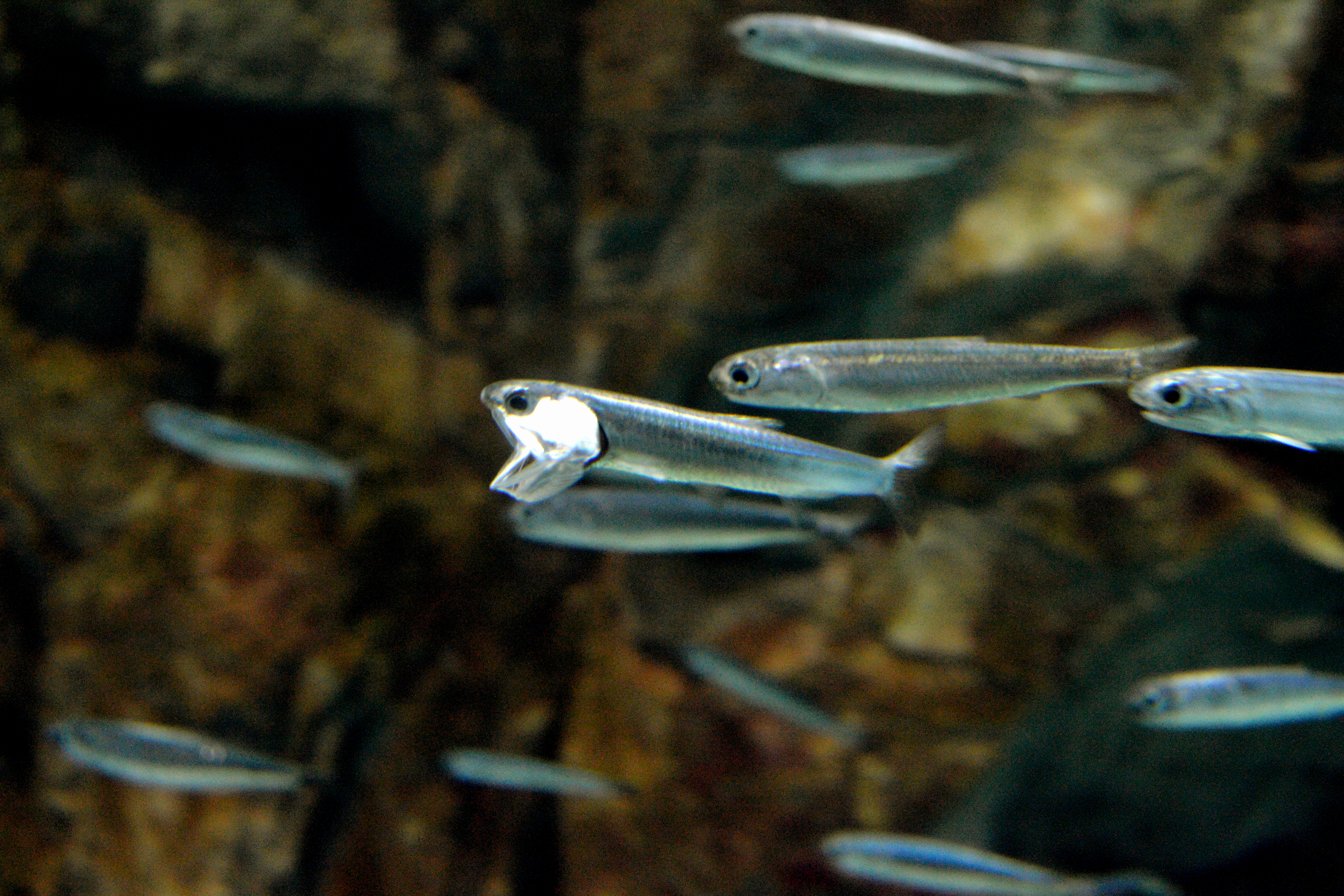 口を開けているカタクチイワシ。海遊館にて。